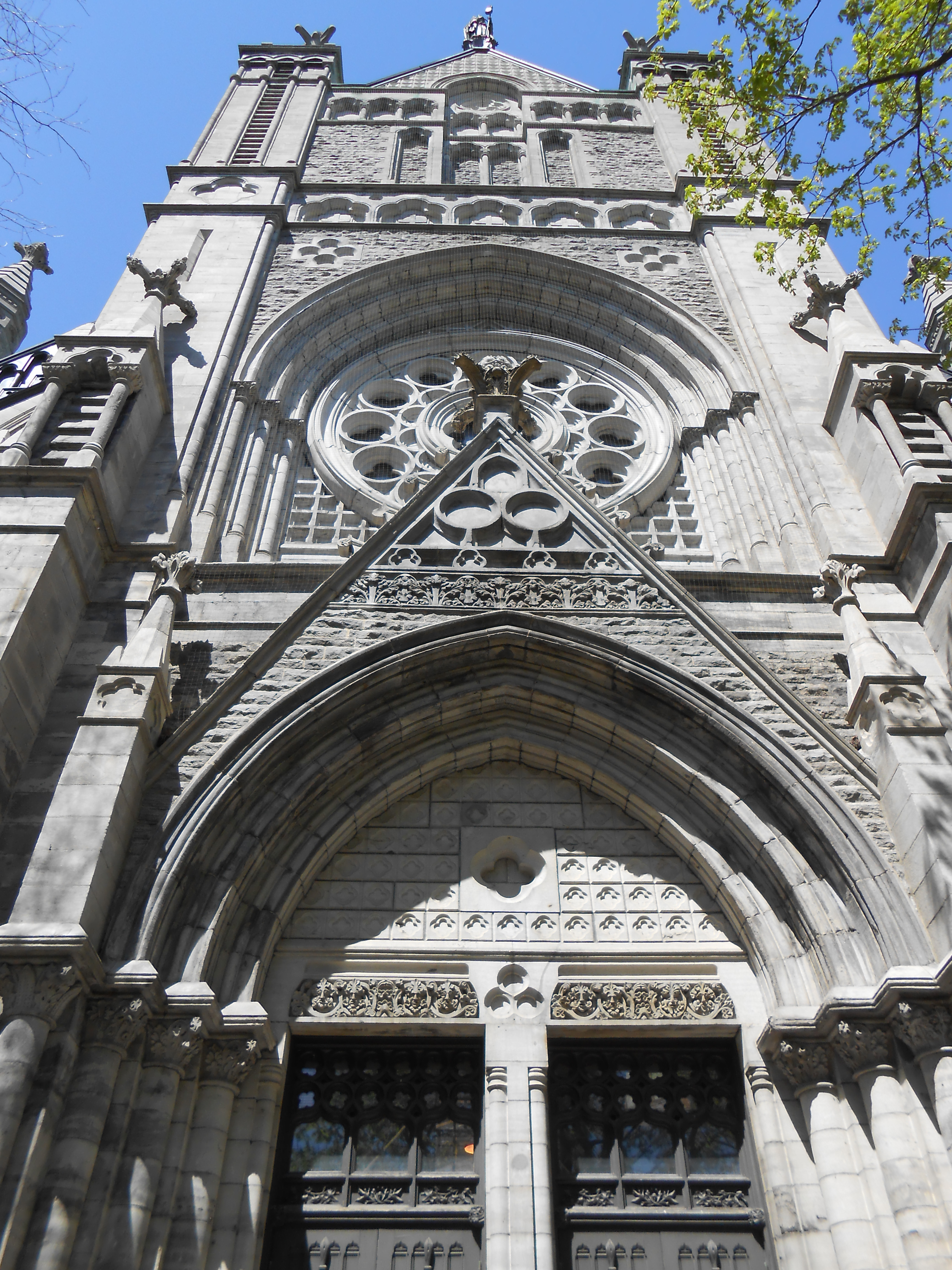 Le transept sud de l'Église-de-Saint-Jacques, classé monument historique, est la façade d'un bras du segment transversal d'un ancien lieu de culte de confession catholique construit de 1889 à 1891. Il est situé au 455, rue Sainte-Catherine Est, dans l'arrondissement de Ville-Marie à Montréal. Il est intégré au pavillon Judith-Jasmin de l'Université du Québec à Montréal.